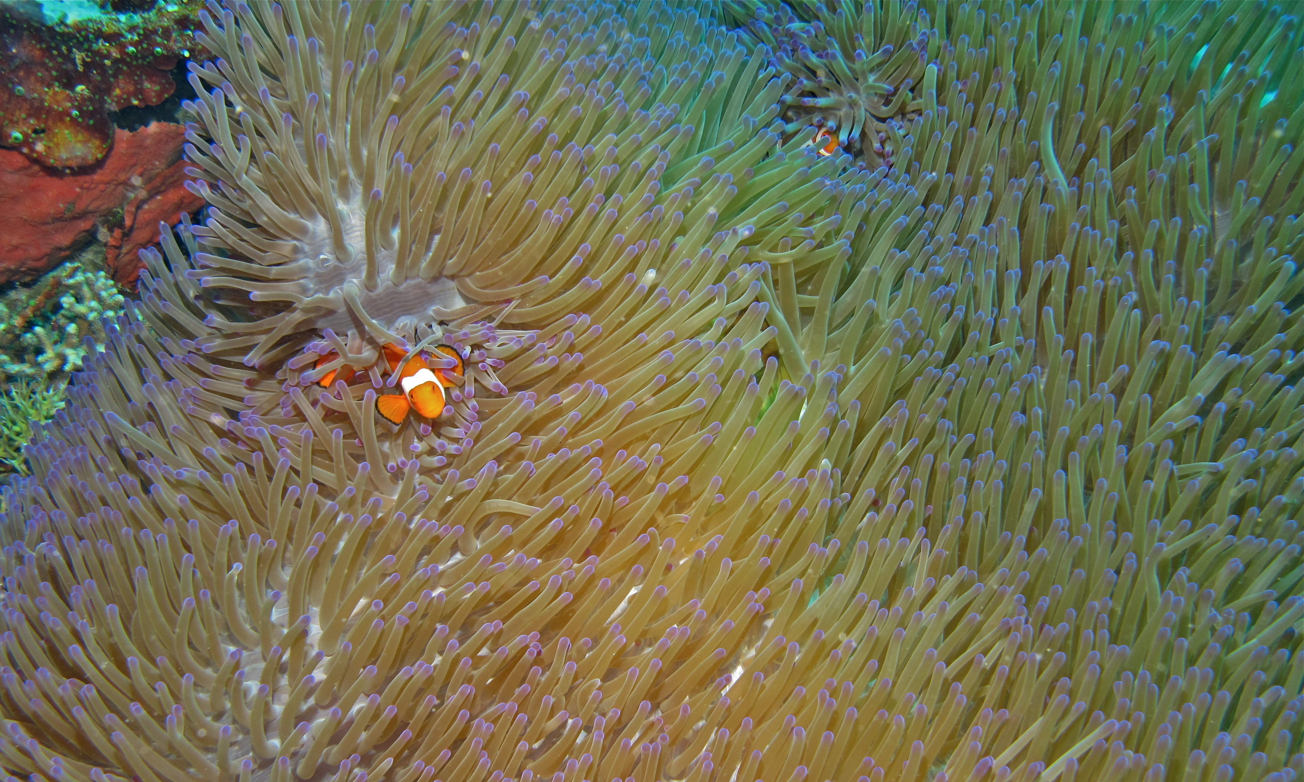 Negeri, Bunaken Island, Sulawesi, INDONESIA